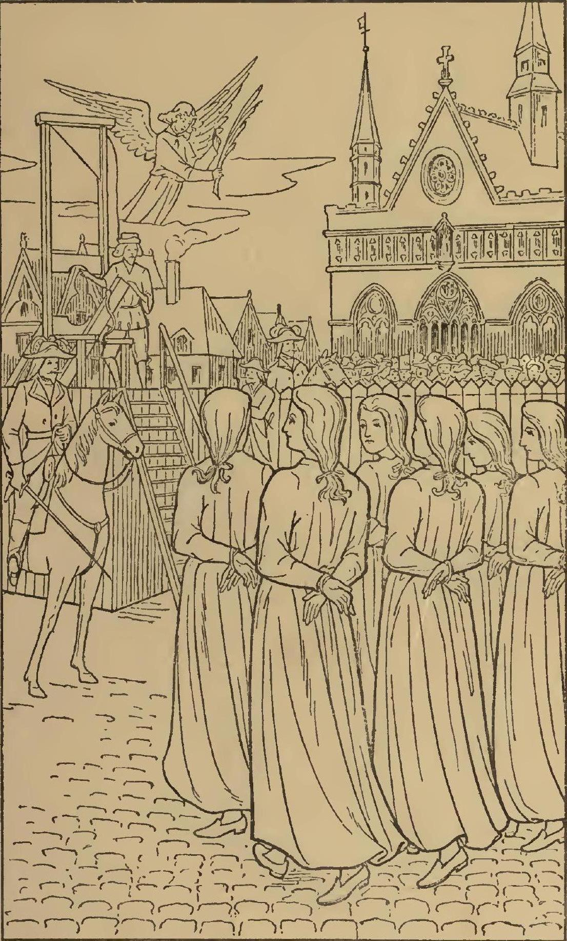 Les derniers moments des Ursulines valenciennoises avant l'échafaud - représentation à connotation catholique par la présence d'un ange, en haut à gauche, de l'illustration.